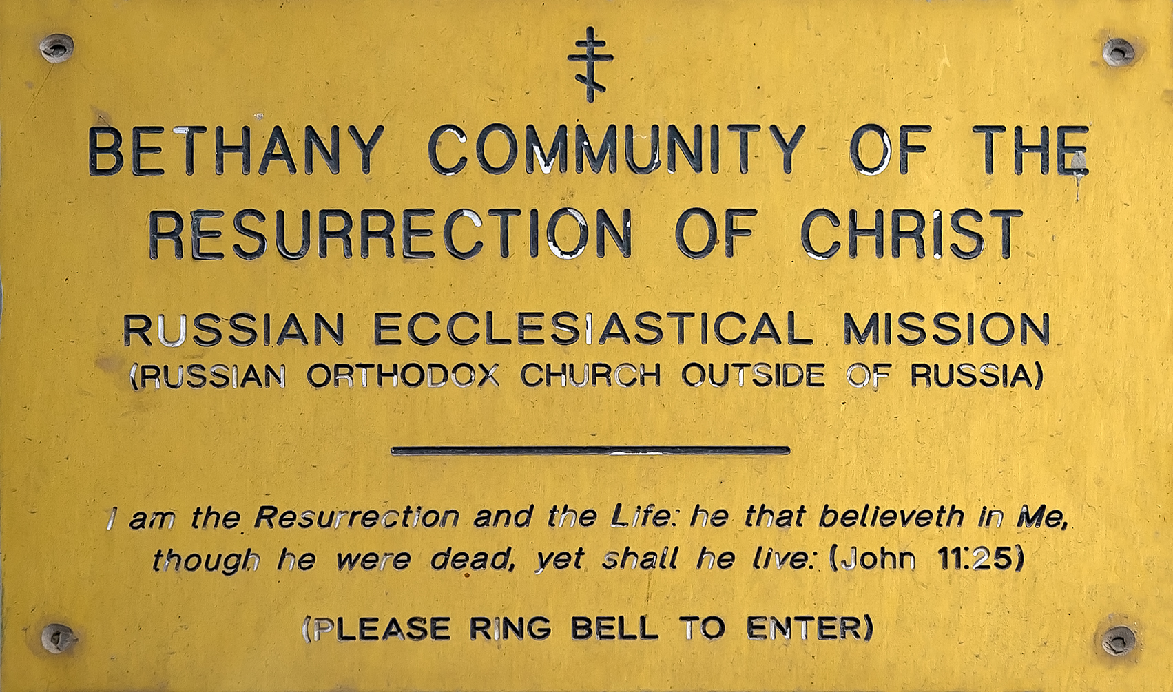 Табличка у входа на территорию русского подворья в Вифании